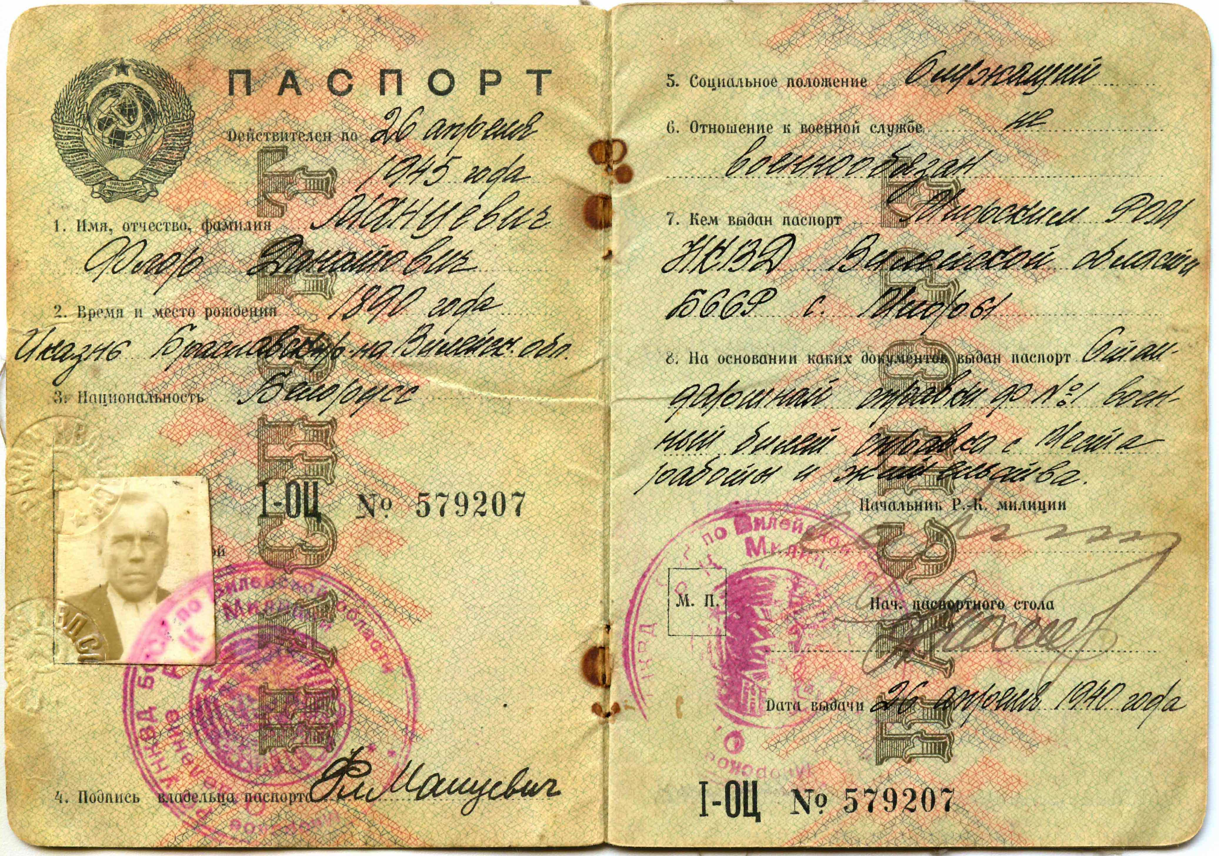 Старонкі 1-2 пашпарта Флора Данатавіча Манцэвіча, 1940 год.